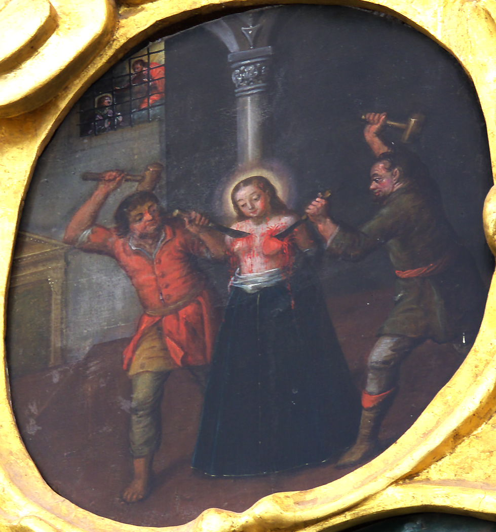 Święta Barbara w kościele w Żarnowcu